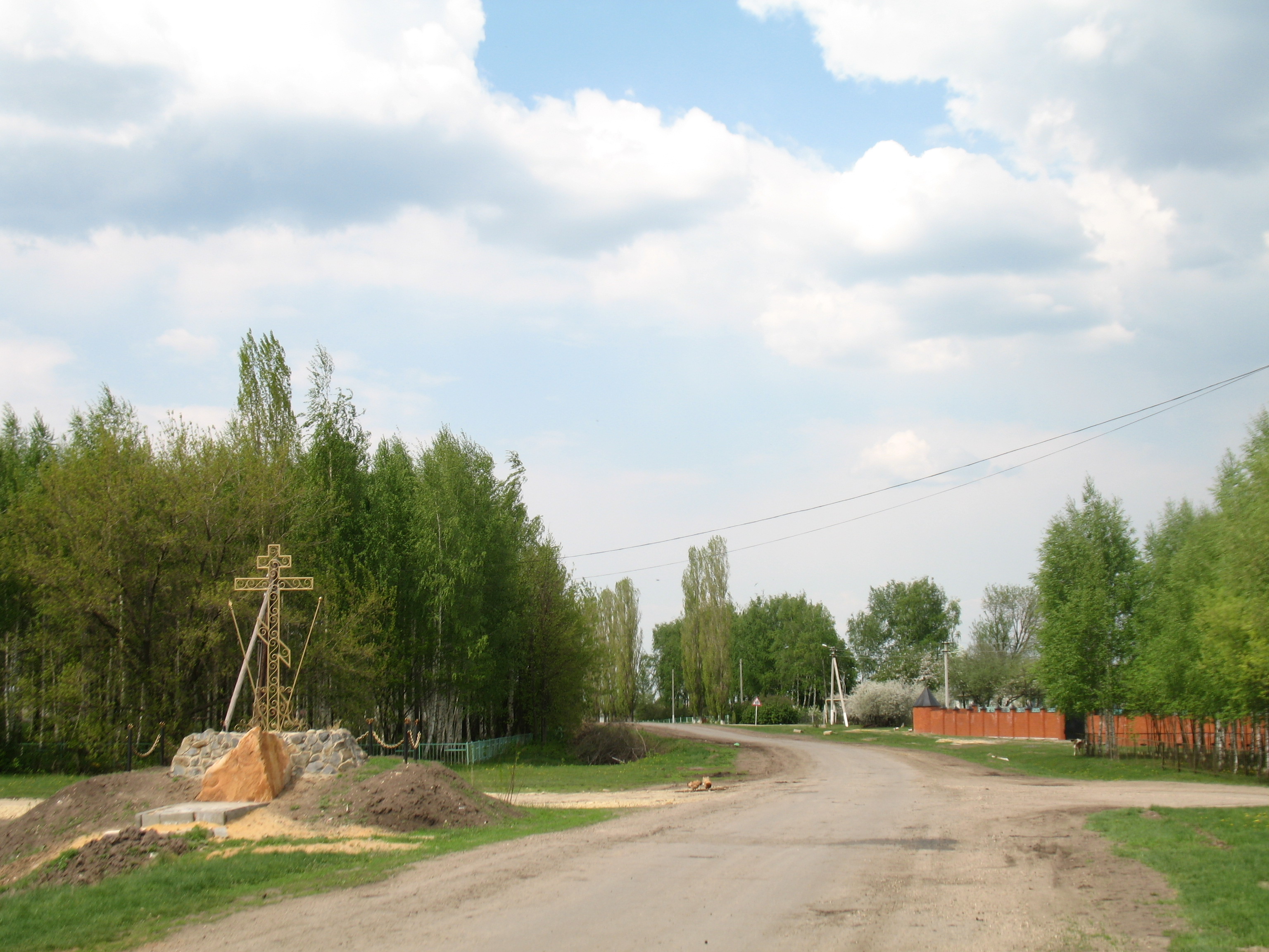 Благовещенский монастырь - крест на дороге перед монастырём, Ожога (Липецкая область), 10 мая 2009 г.